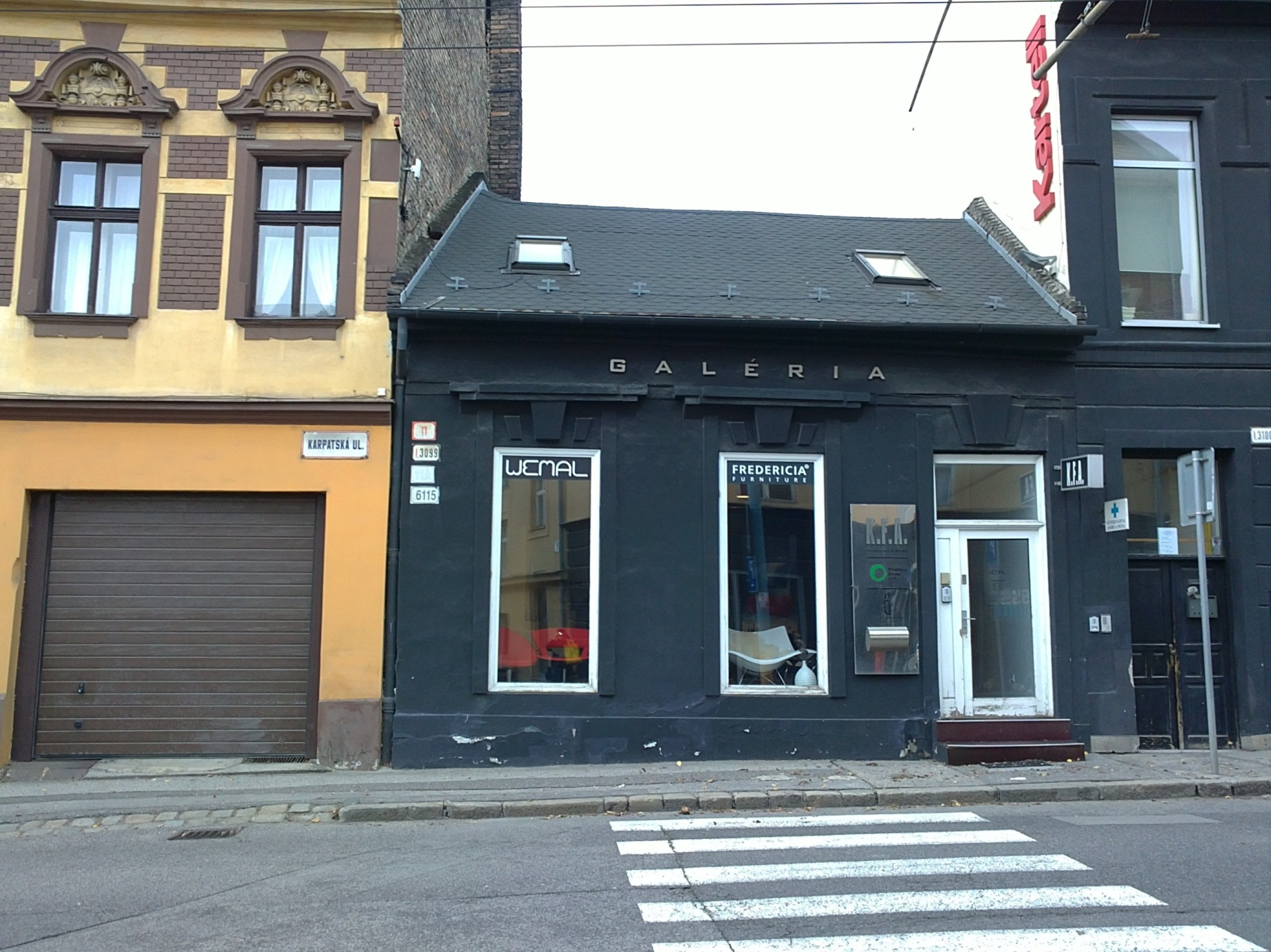 Amnesty International Slovensko, Karpatska 11